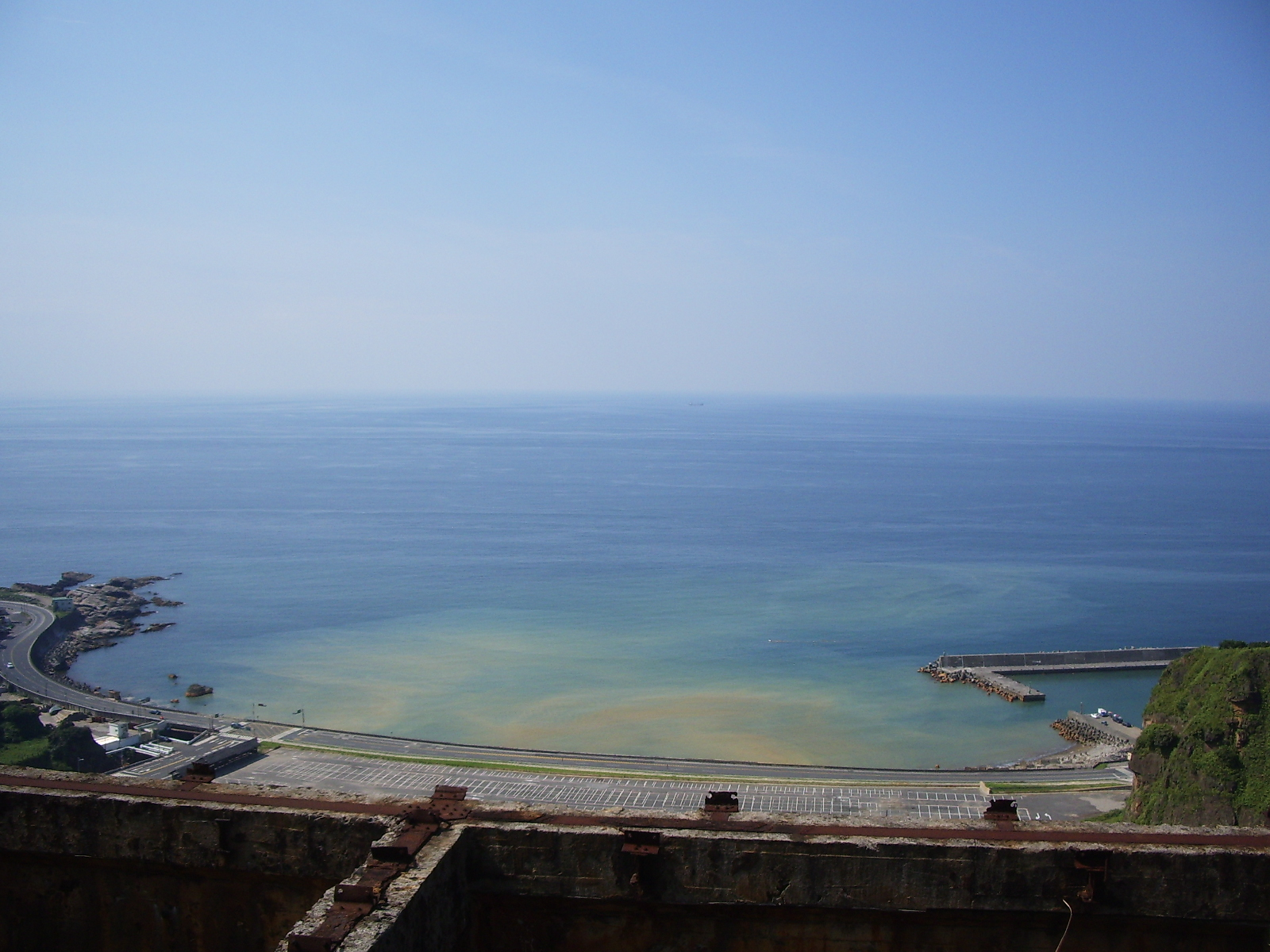 文清於960703水湳洞選礦場拍陰陽海